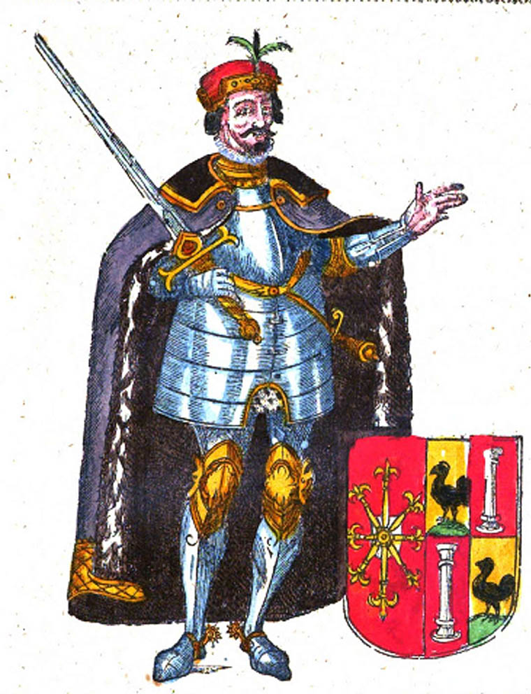 Diederik III